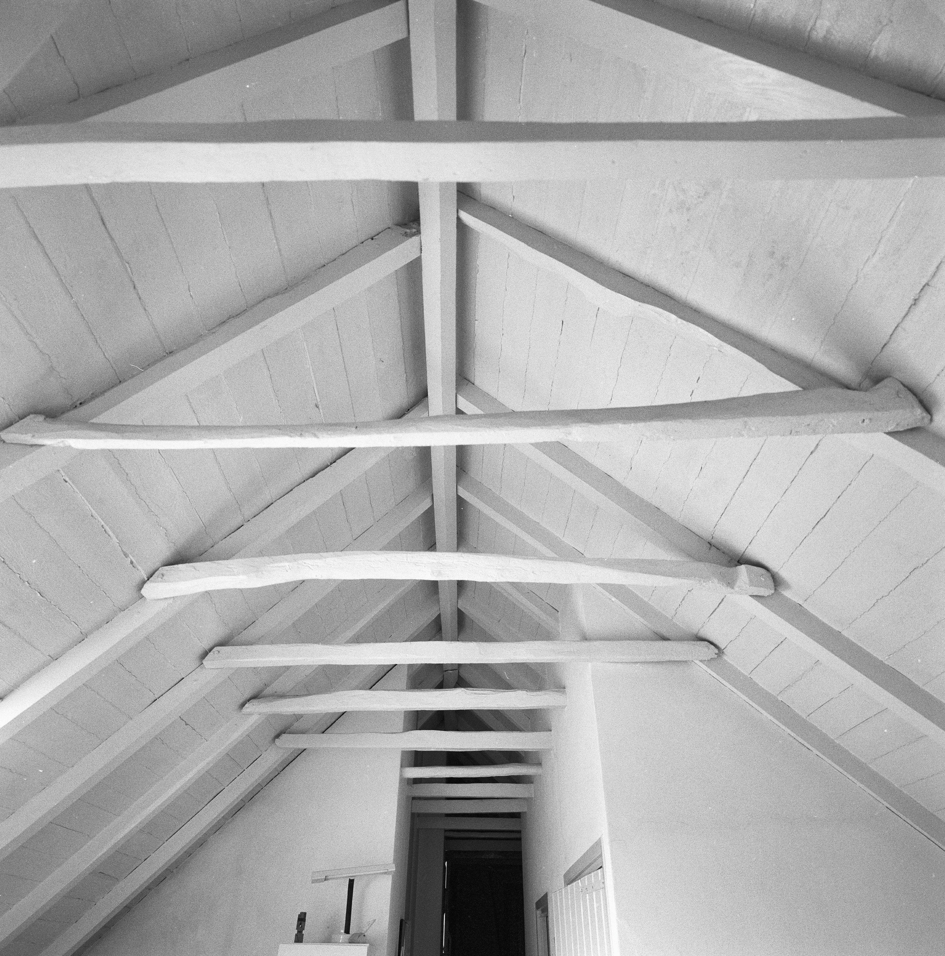 Gebint: Interieur, overzicht gebint